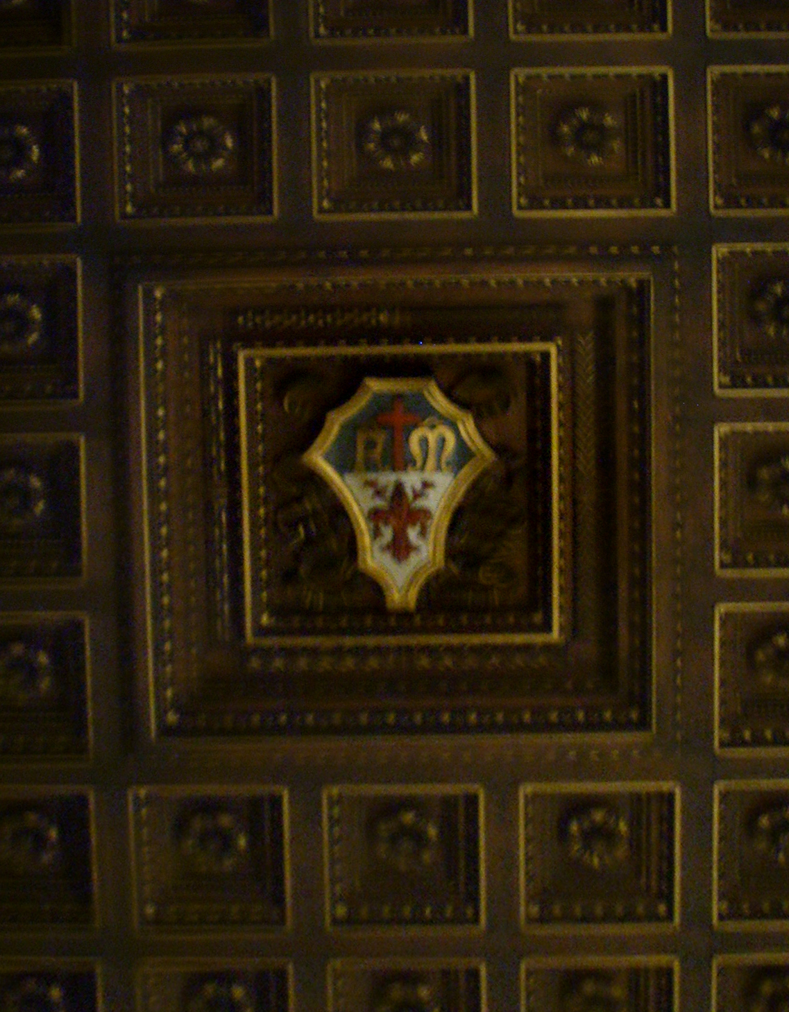 Chiesa_della_misericordia, ceiling